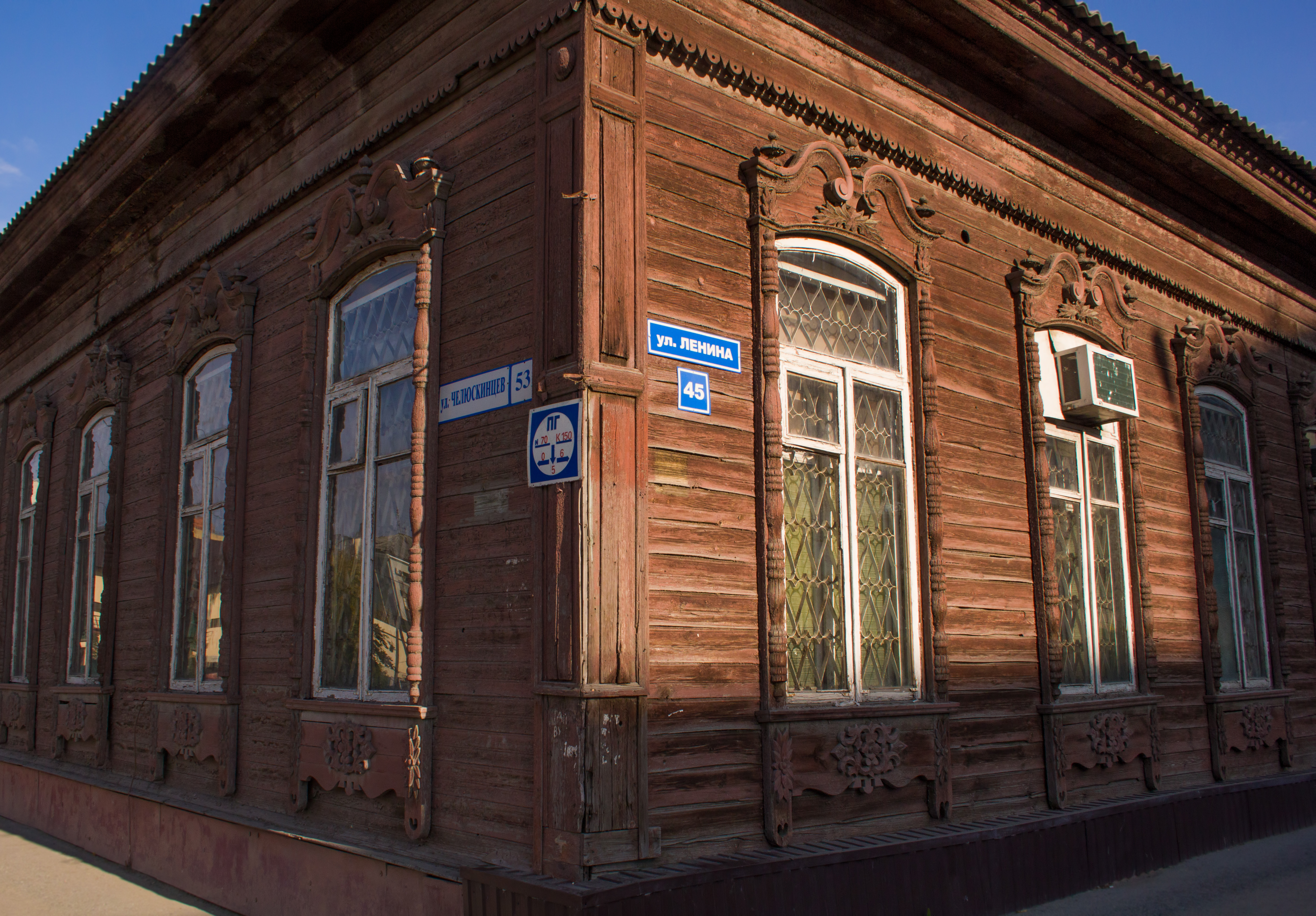 Дом жилой: улица Ленина, 45 / улица Челюскенцев, 53, Тюмень, Тюменская область